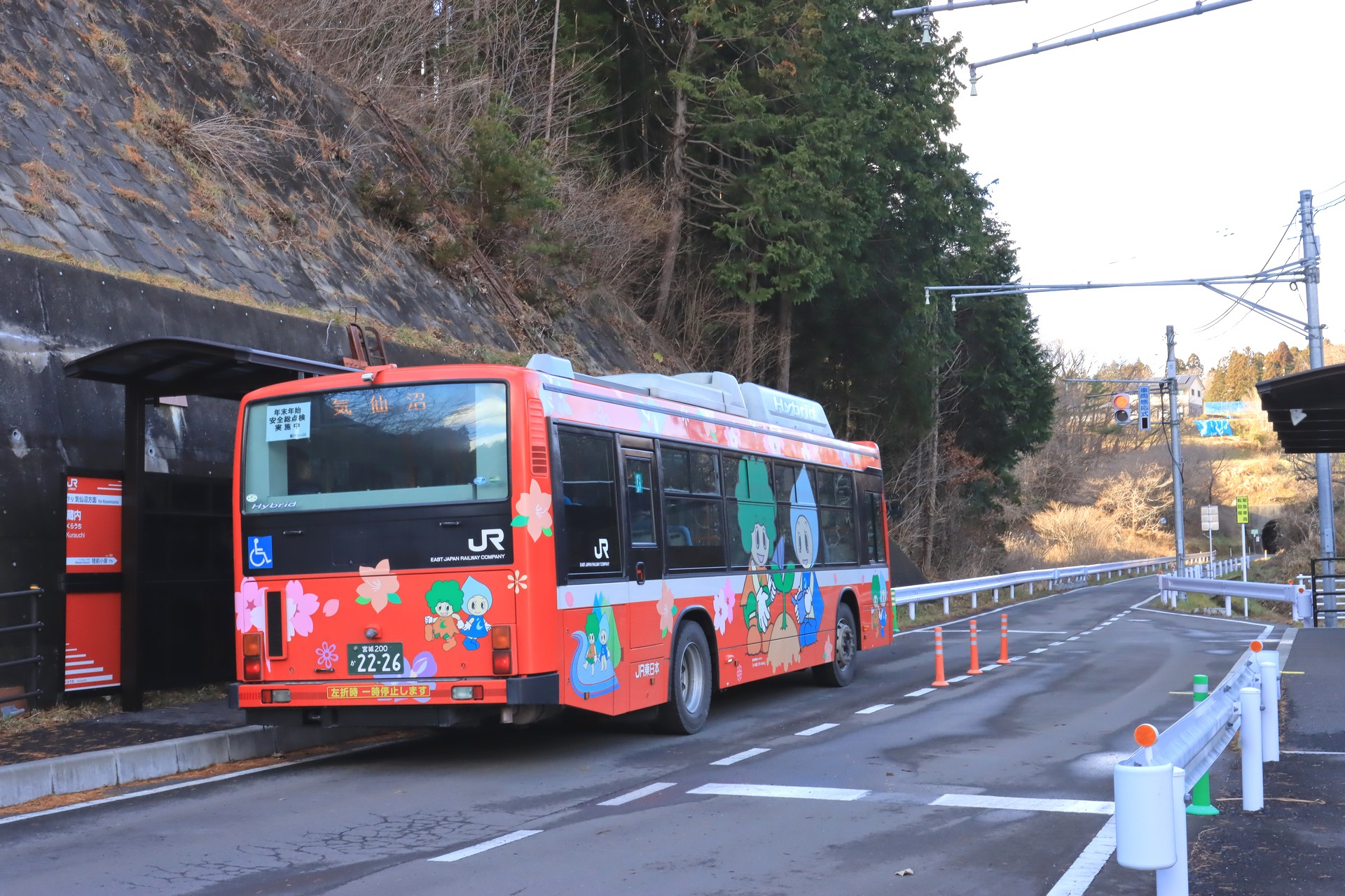 宮城県気仙沼市に所在する、JR東日本・気仙沼線BRTの蔵内駅。気仙沼行きのバスが停車中。